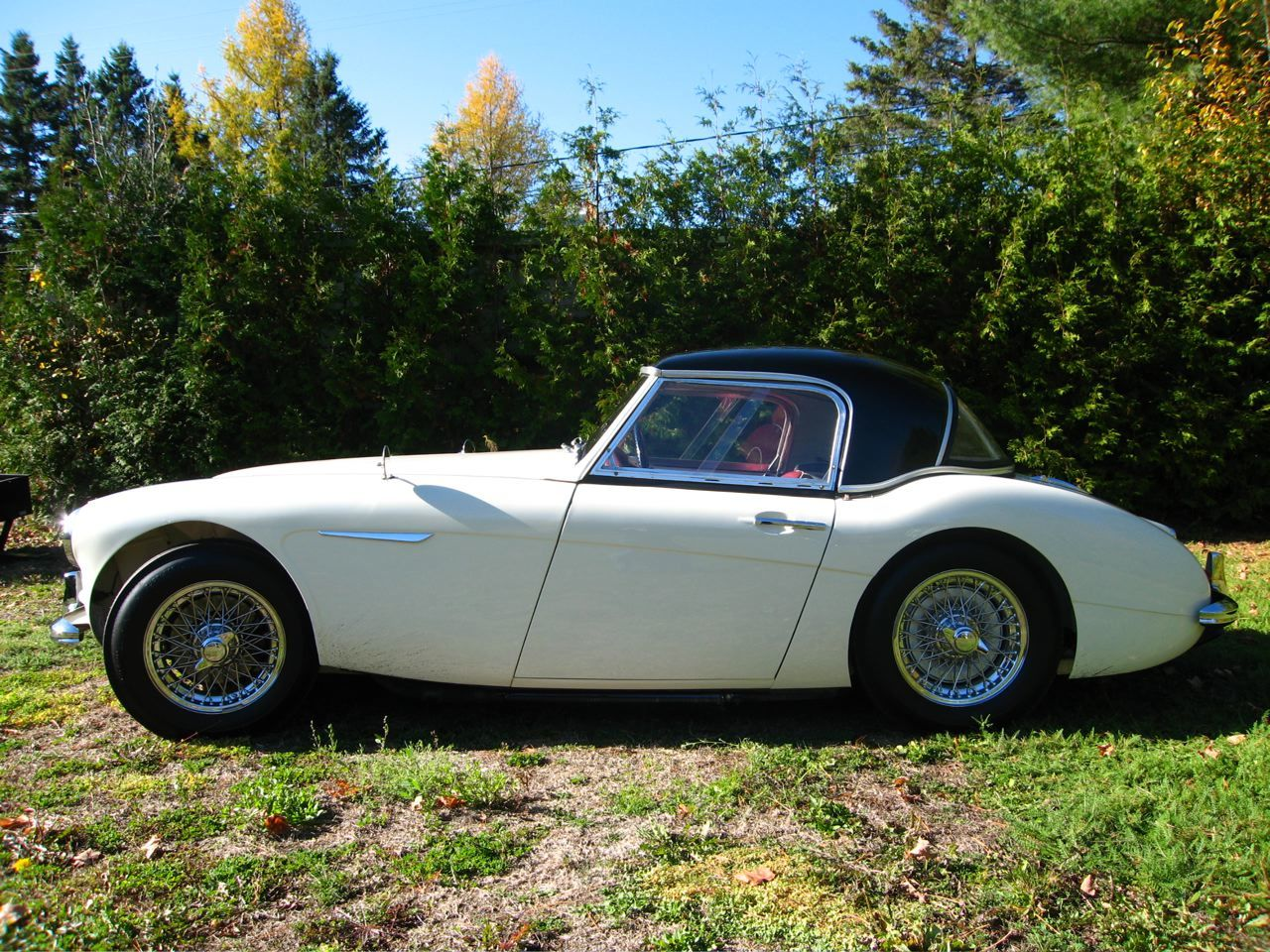 1960 BN7